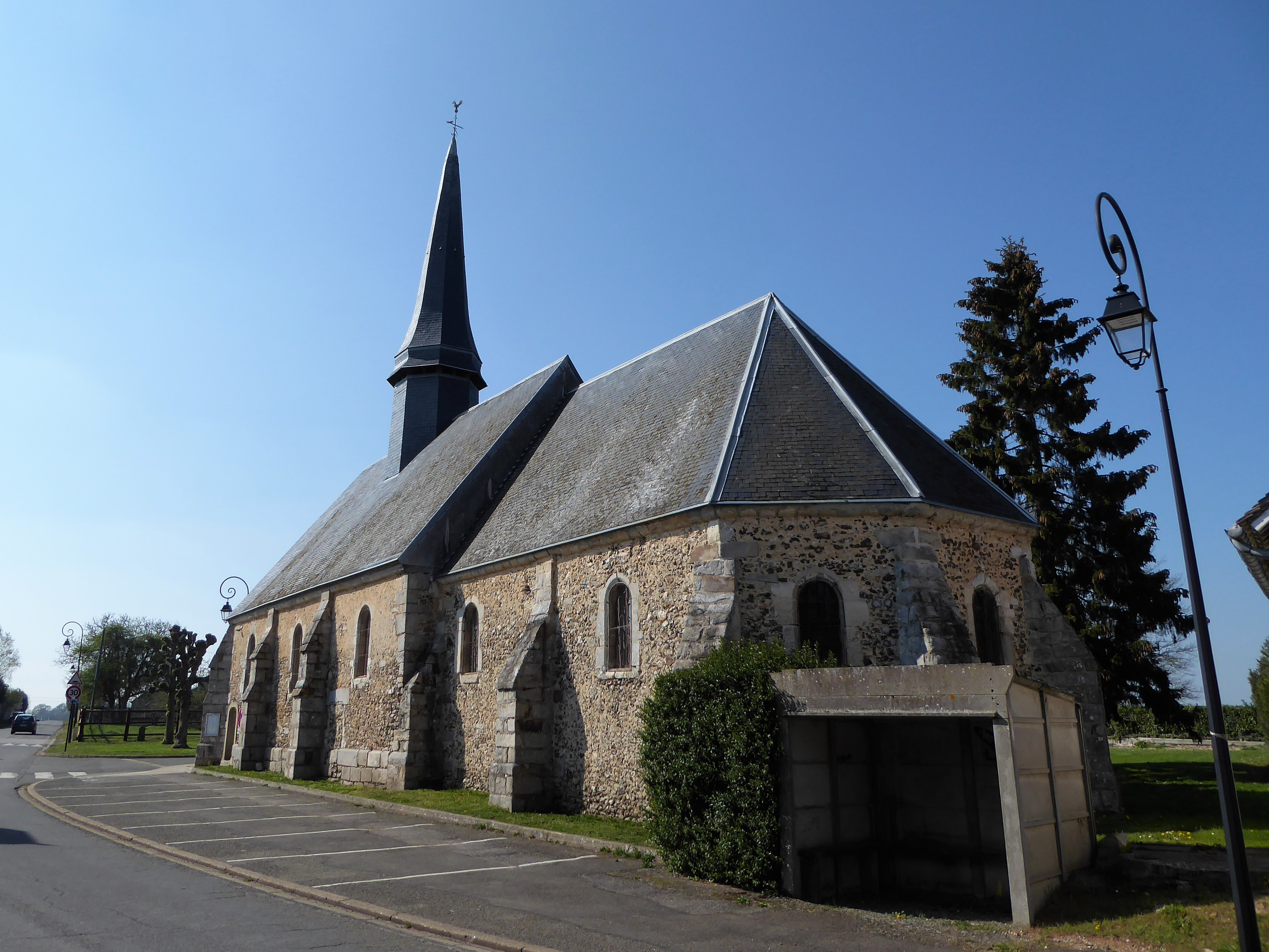 chevet de l'église Saint-Blaise d'Havelu, Eure-et-Loir, France.